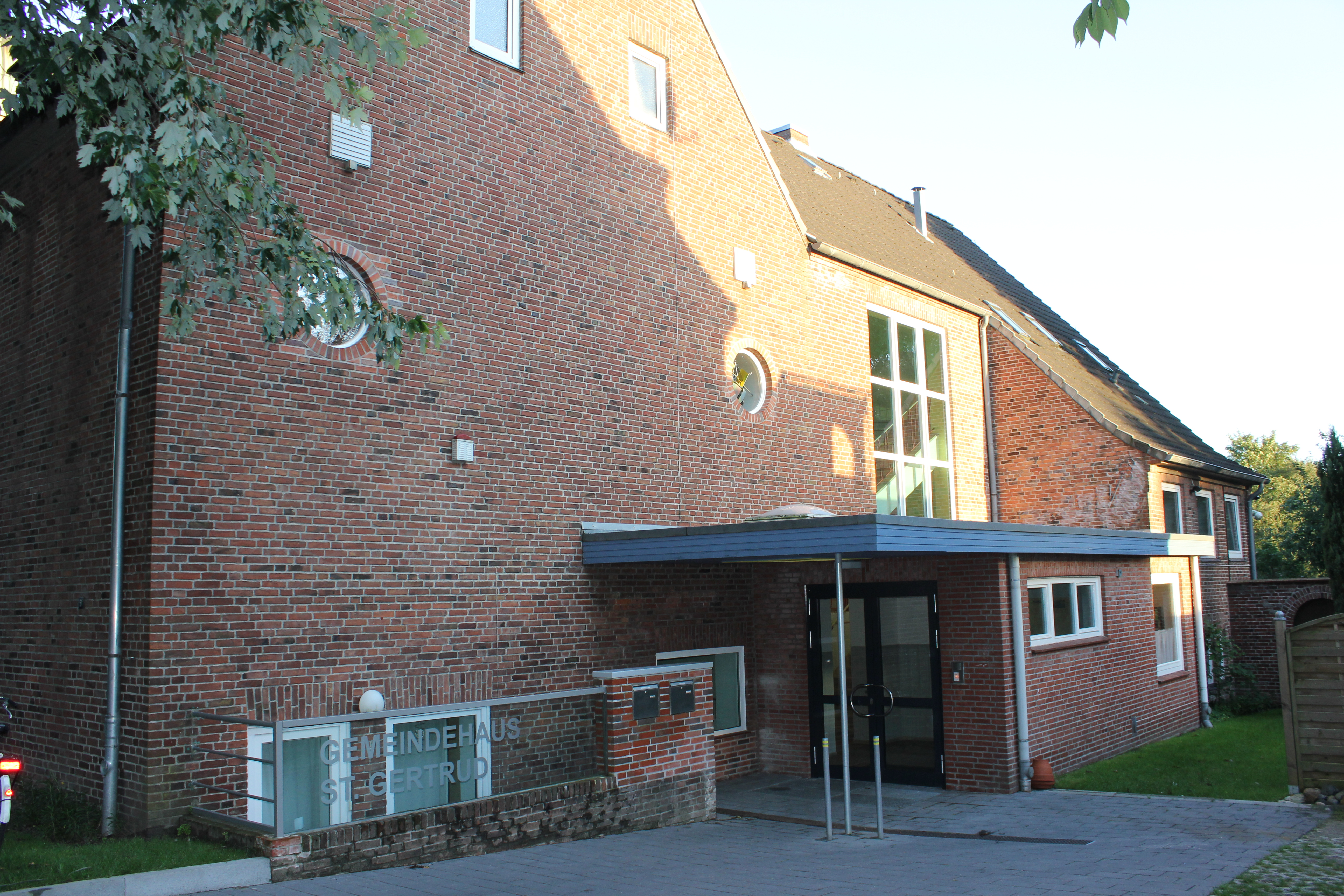 An der Seite der St. Gertrudkirche (Flensburg)